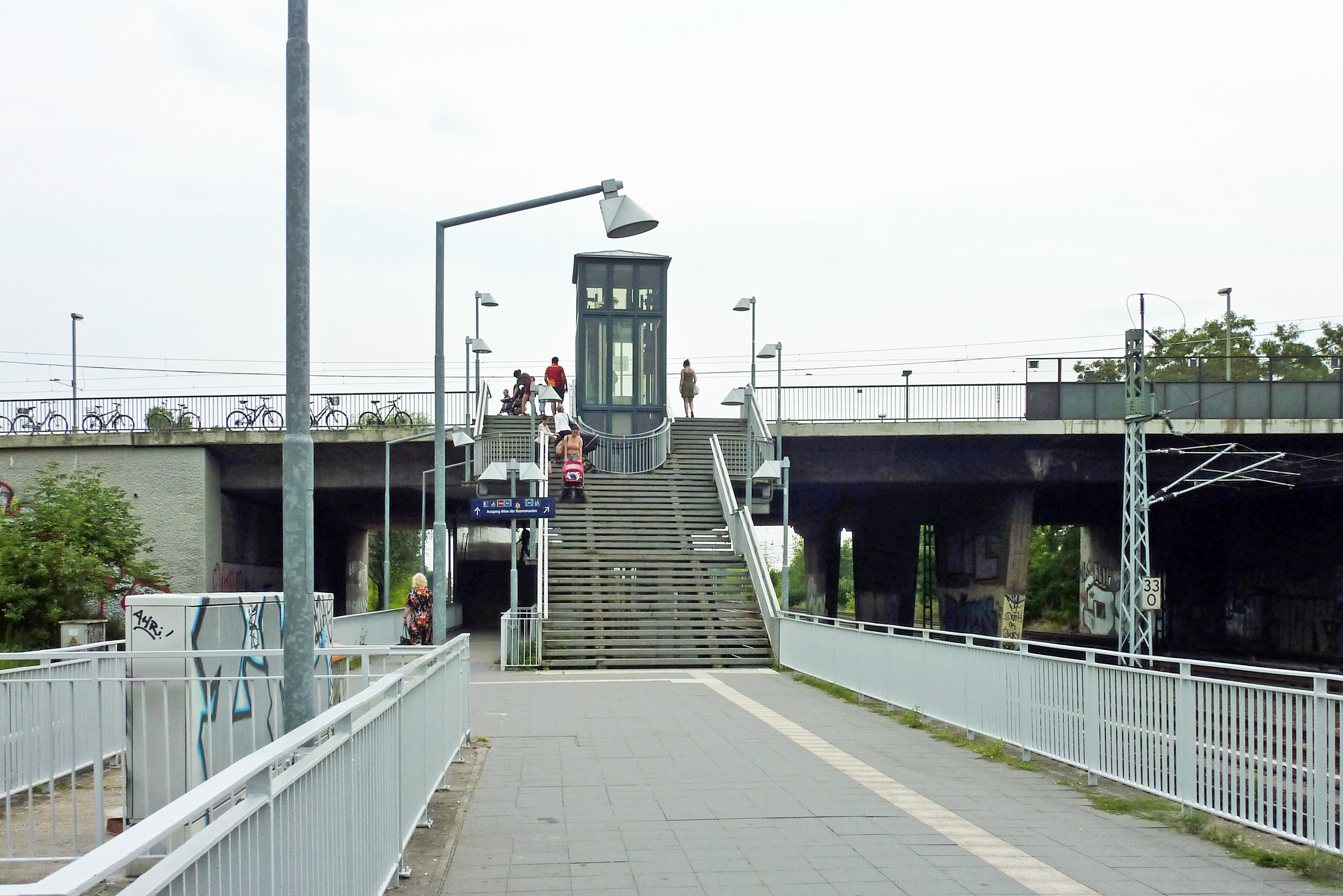 S-Bahnhof Springpfuhl in Berlin-Marzahn: Blick zur Treppe mit Aufzug an der Brücke der Allee der Kosmonauten.